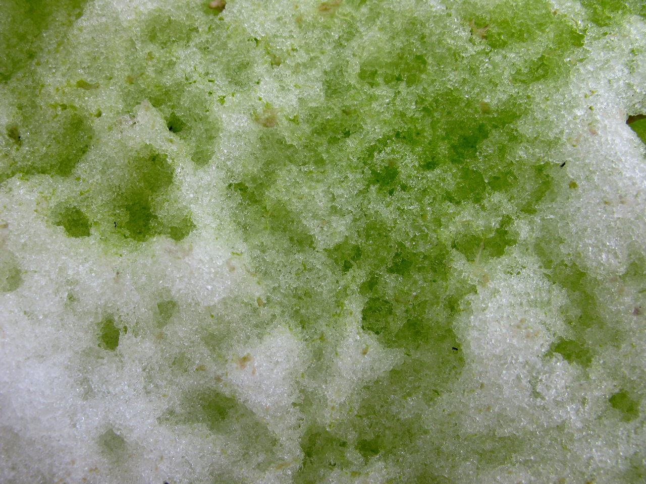 Chlamydomonas nivalis (Antarctique) 2009